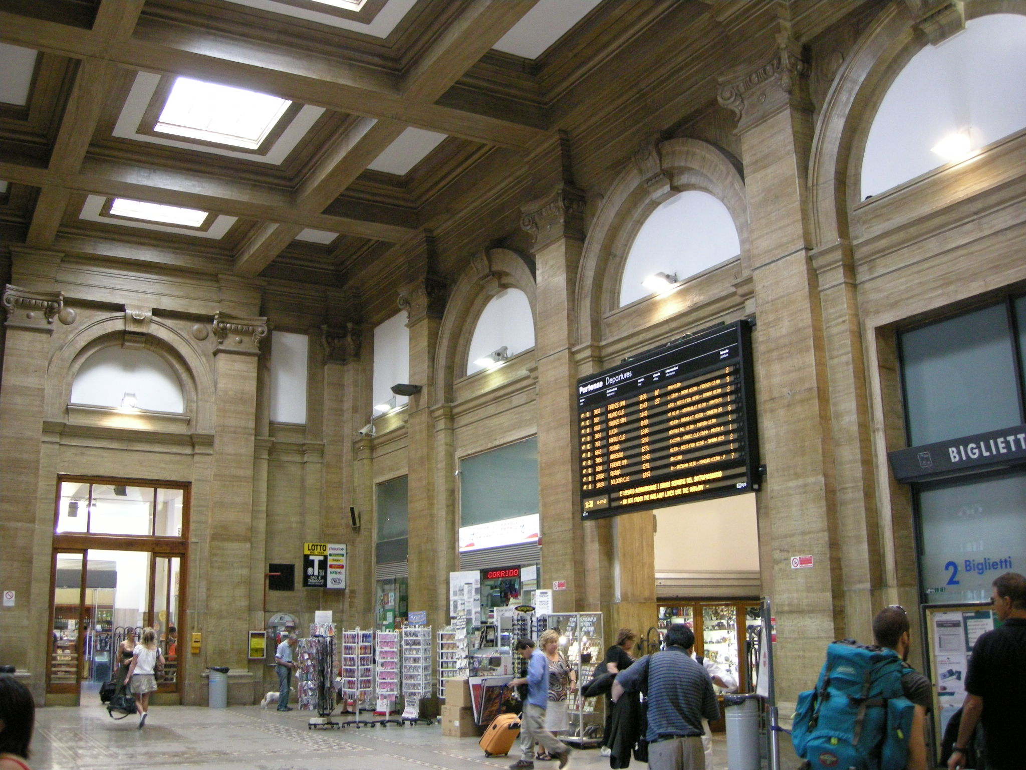 Stazione di prato centrale, sala biglietteria